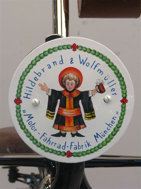 Hildebrand & Wolfmüller logo 1894.